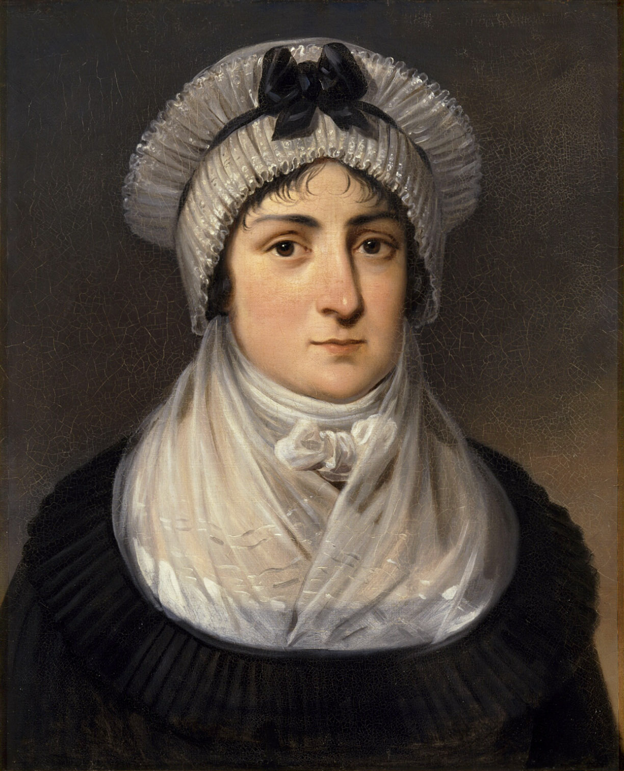 Posthumous portrait